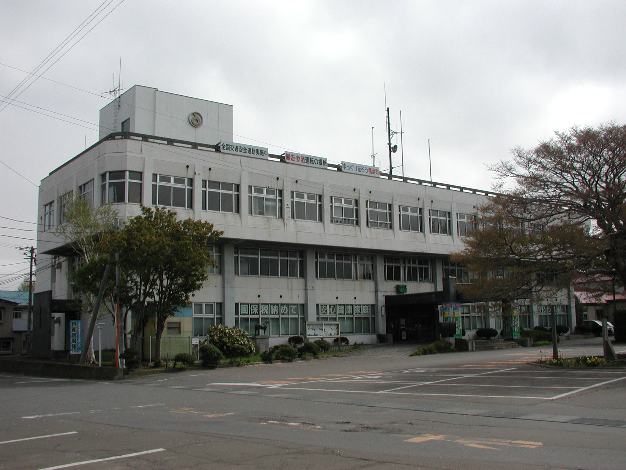 横浜町役場